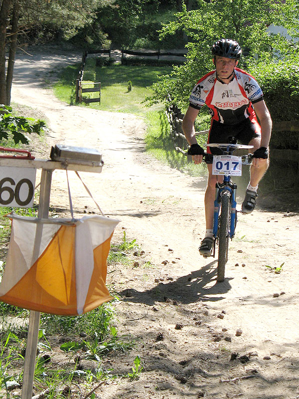 MTBO rider Robert Zabel